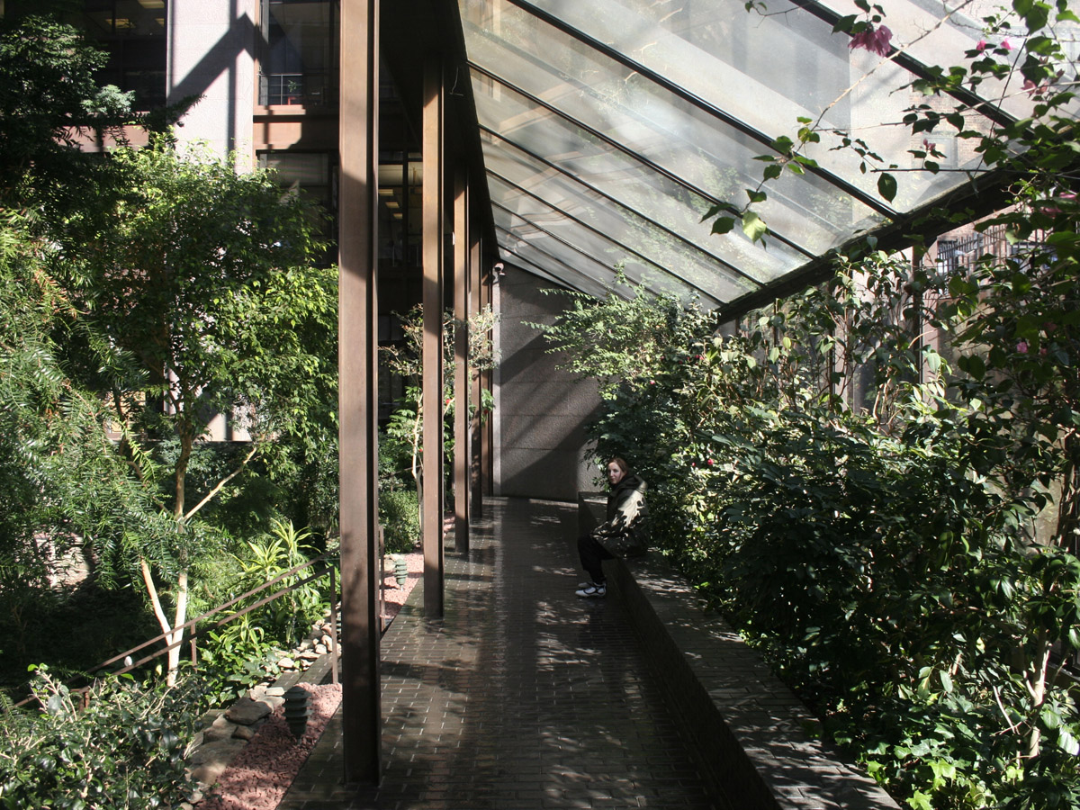 Εσωτερικός κήπος.